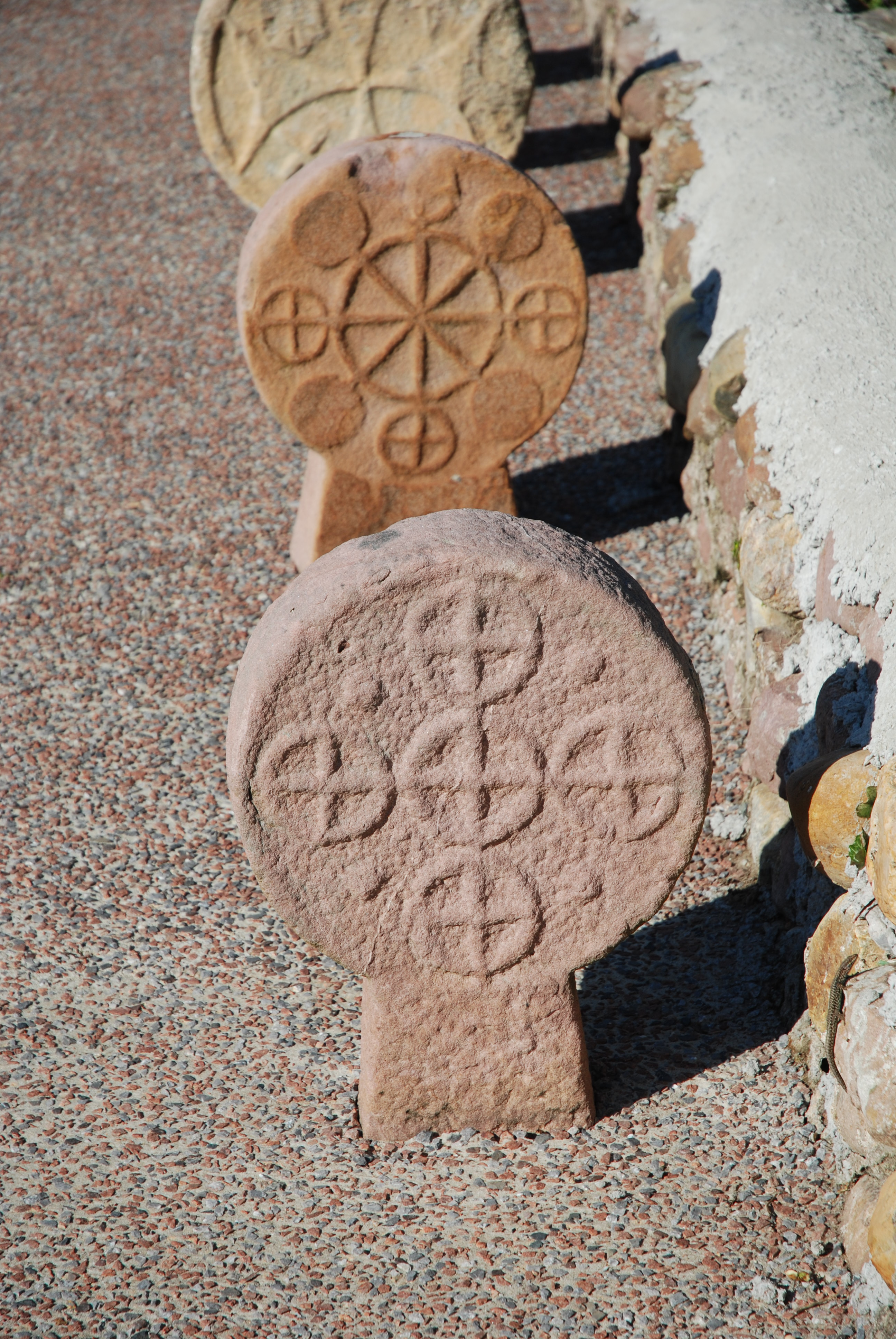 Itxassou, stèle basque